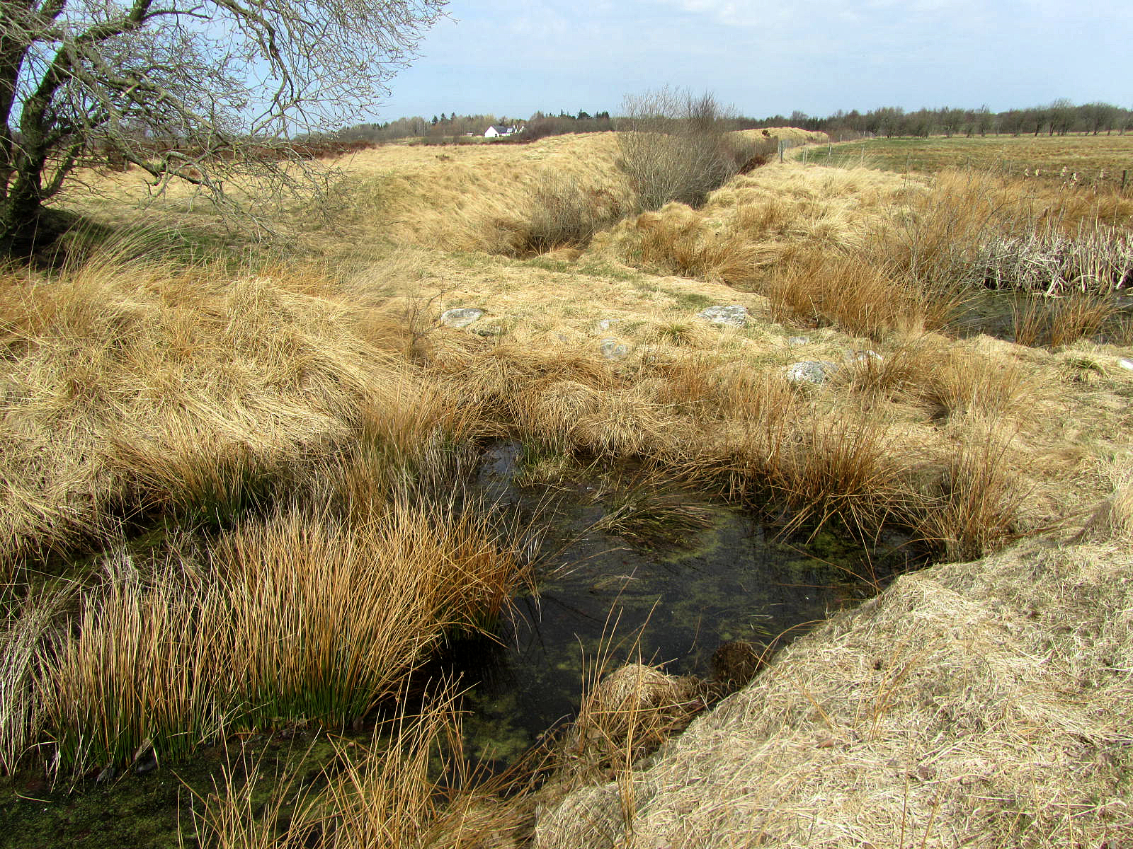 Borremose, Den brolagte vej ind til fæstningsbyen